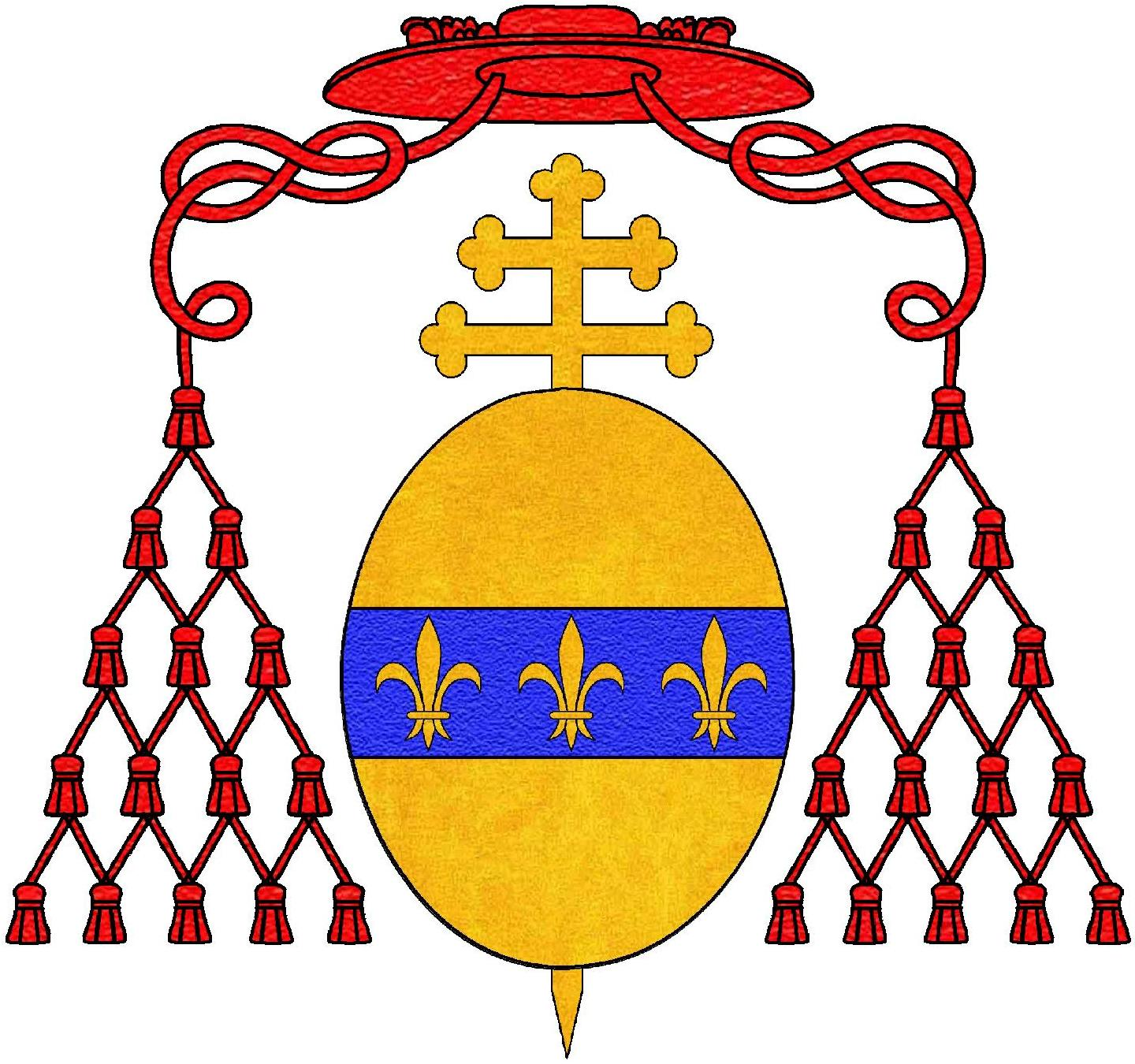 Stemma del cardinale Angelo Maria Querini